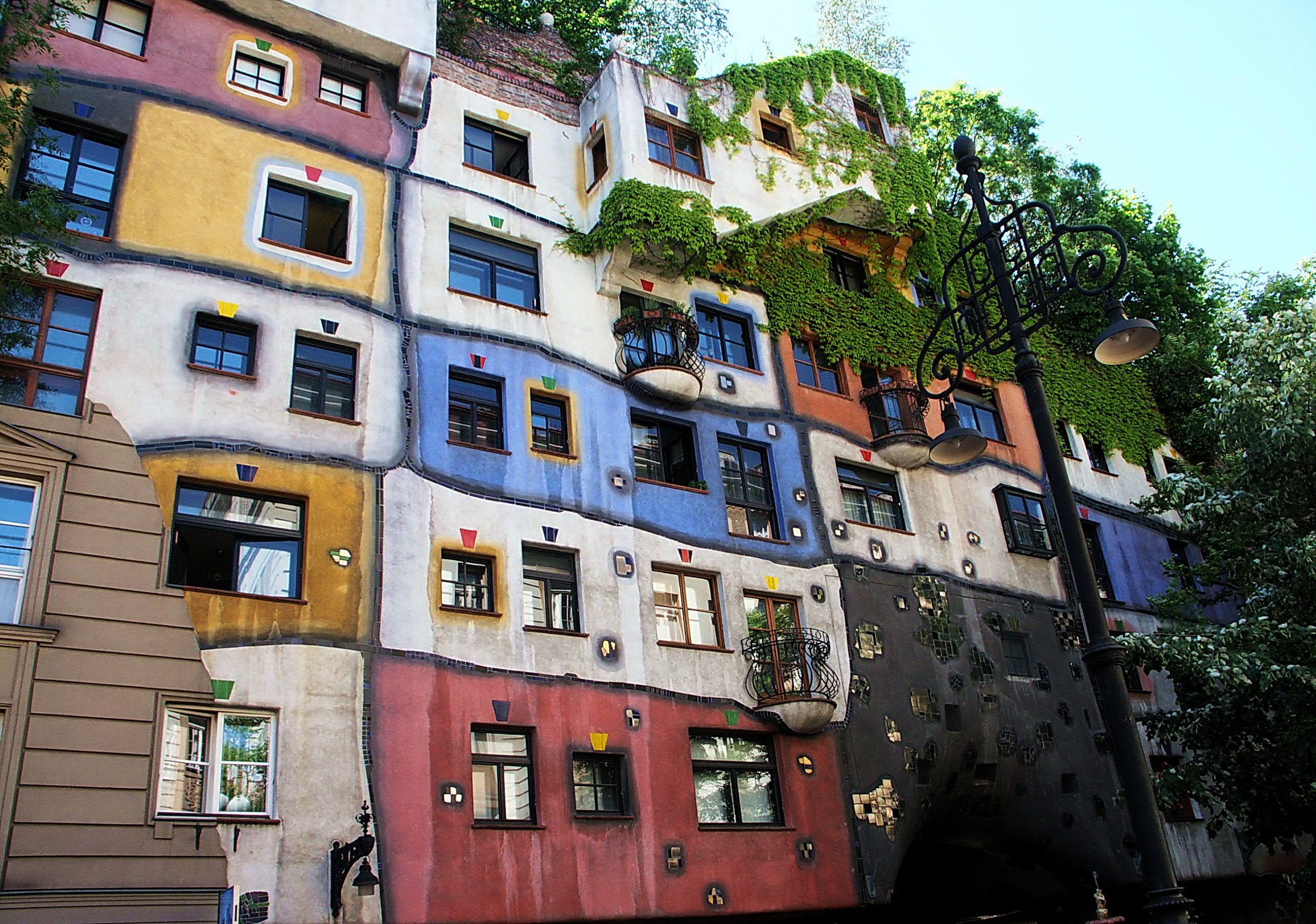 百水公寓 Hundertwasser House